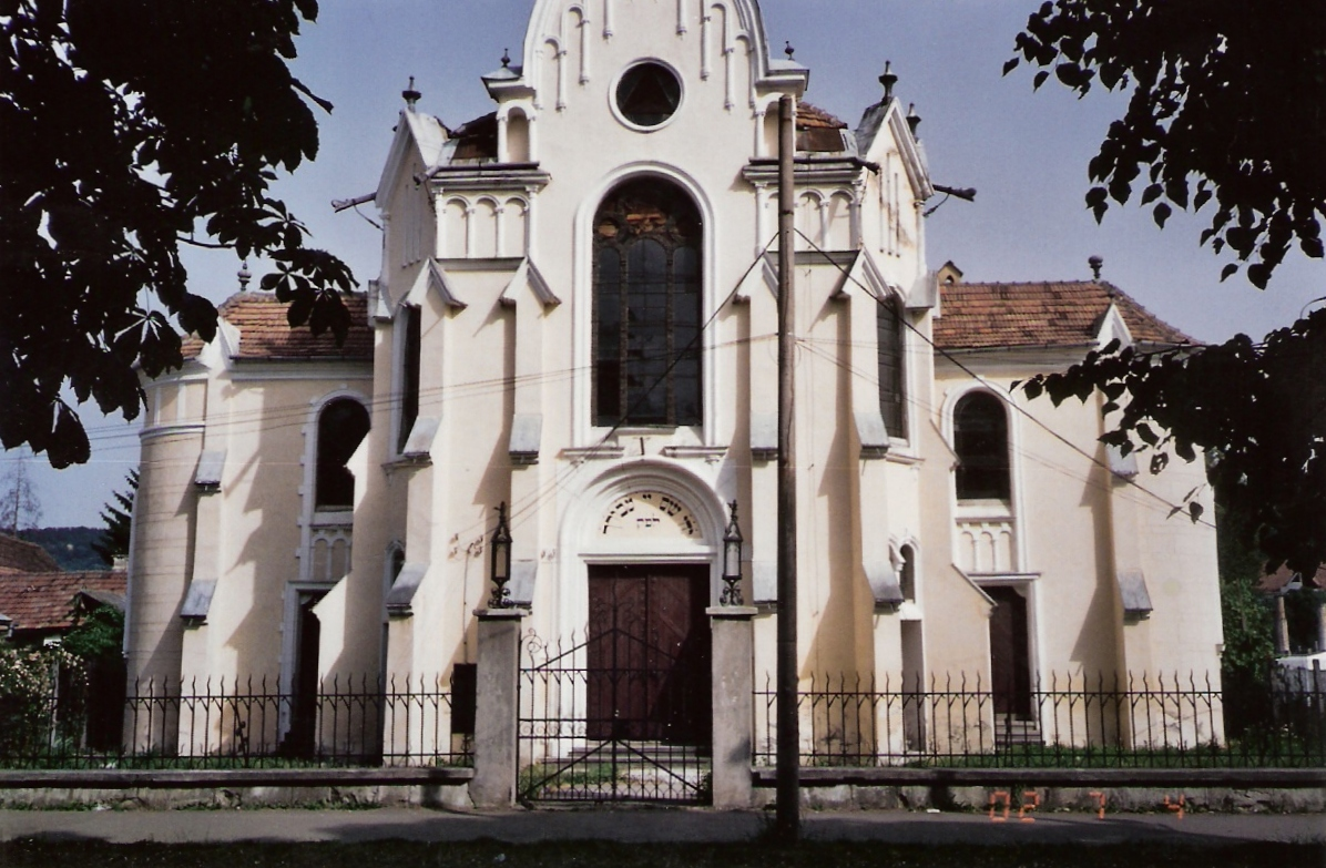 Synagogue in Bistriţa, Romania